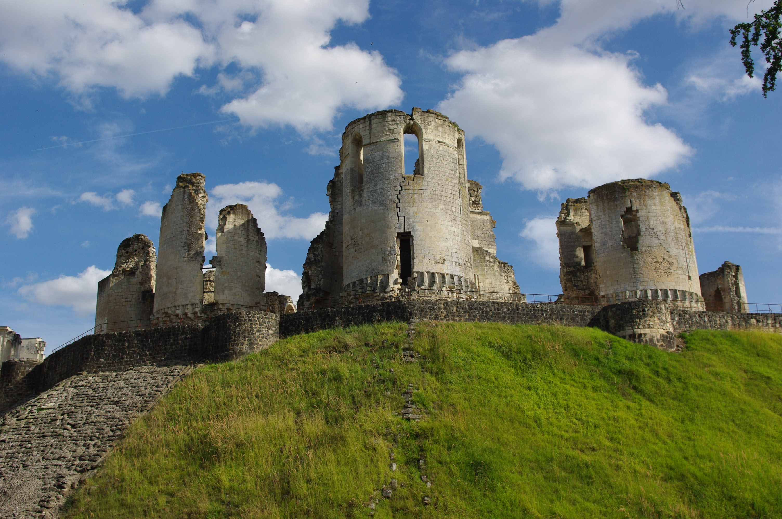 Ruines du château de Fère-en-Tardenois